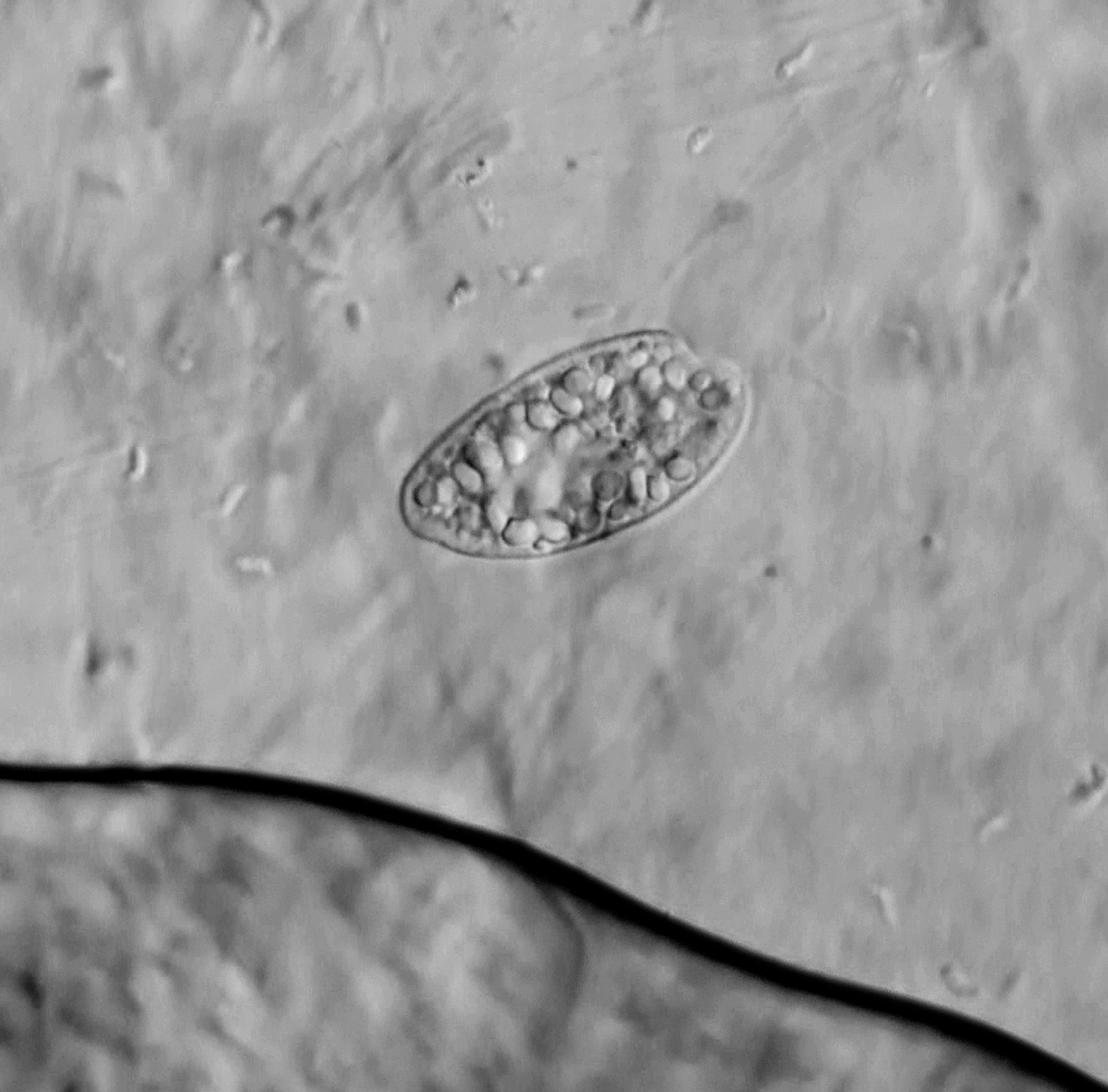 Chilomonas - 400x